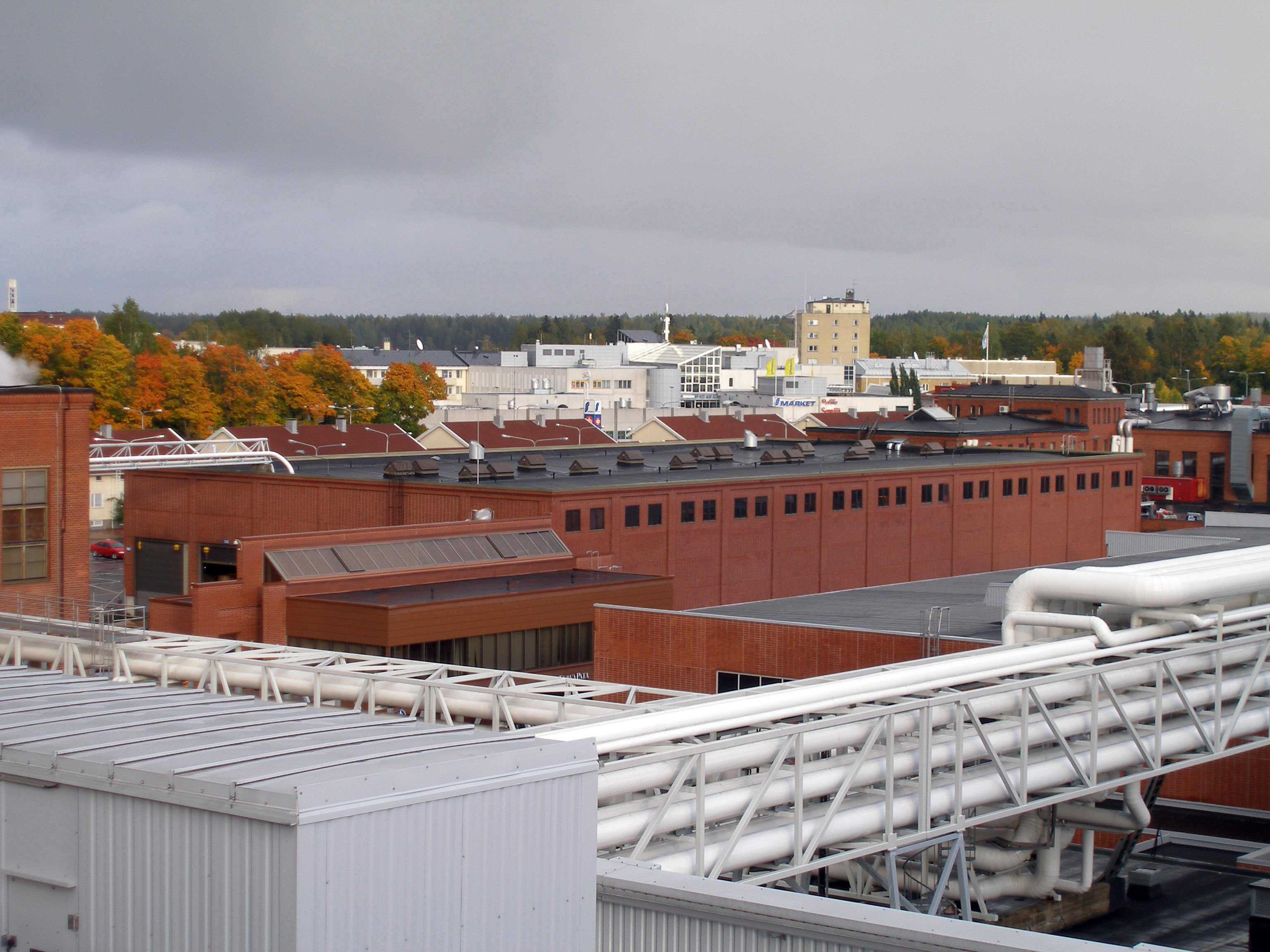 Tervasaari Paper Mill